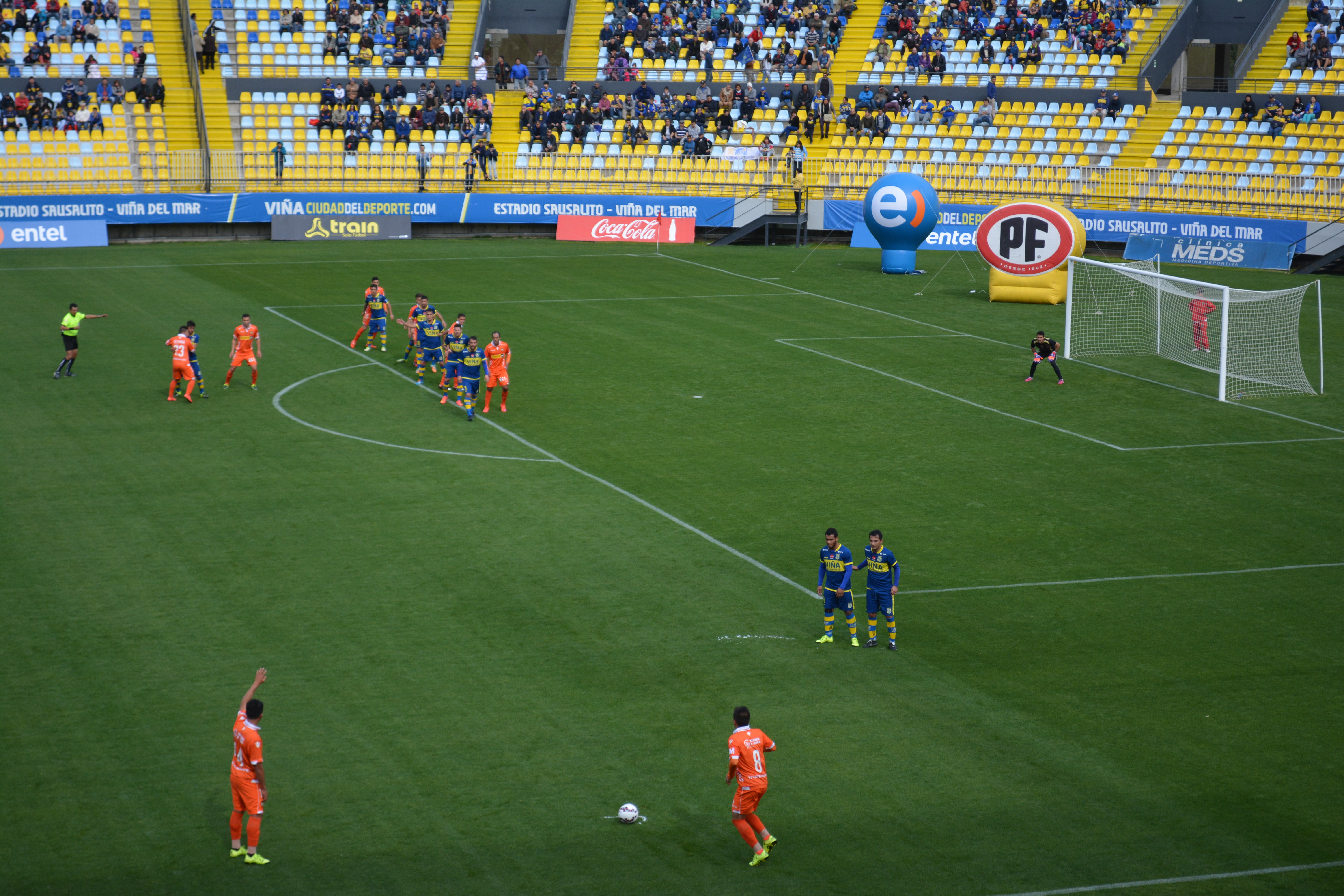 Everton - Cobreloa, 23-08-2015